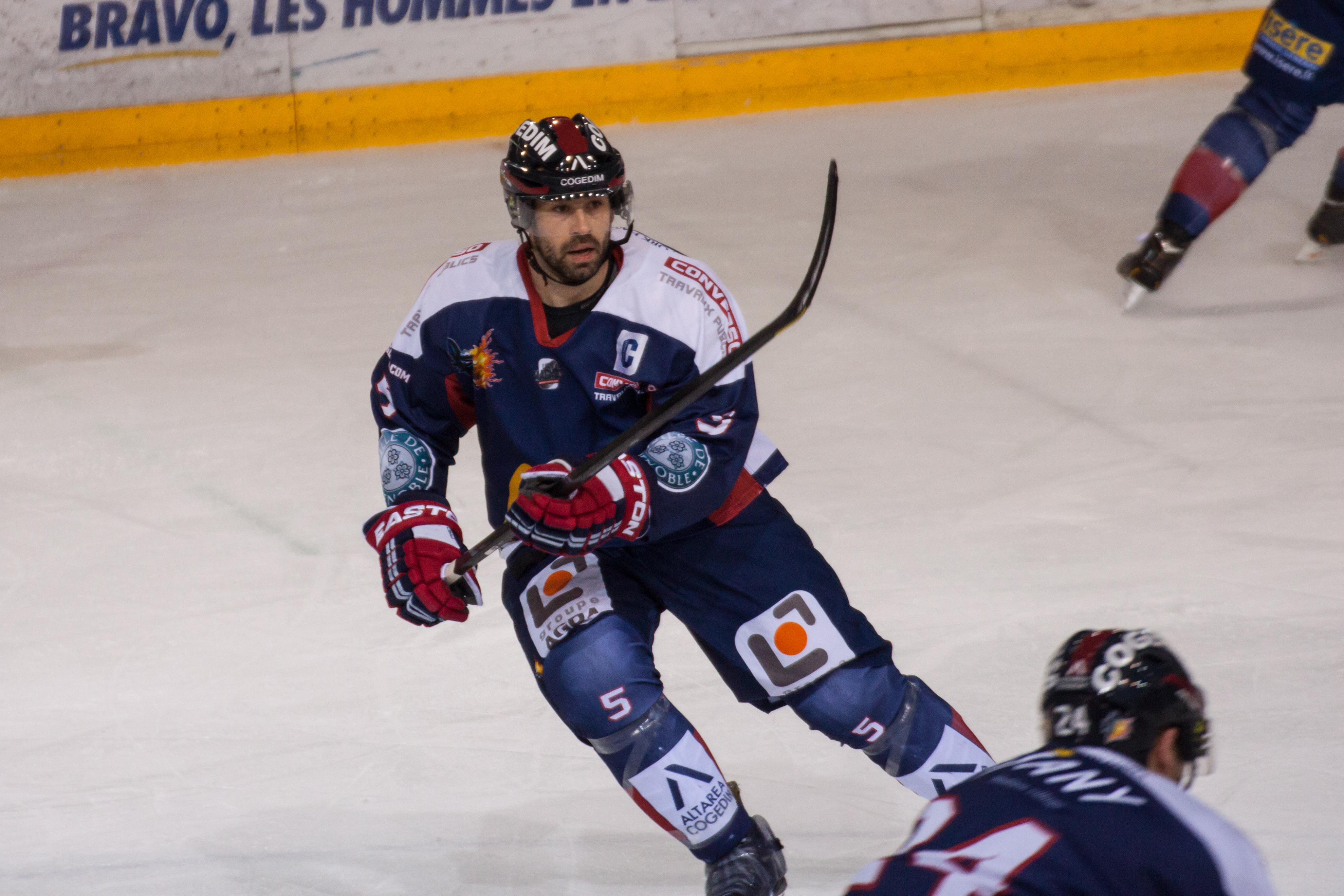 Baptiste Amar avec le maillot de Grenoble contre Rouen en février 2014.